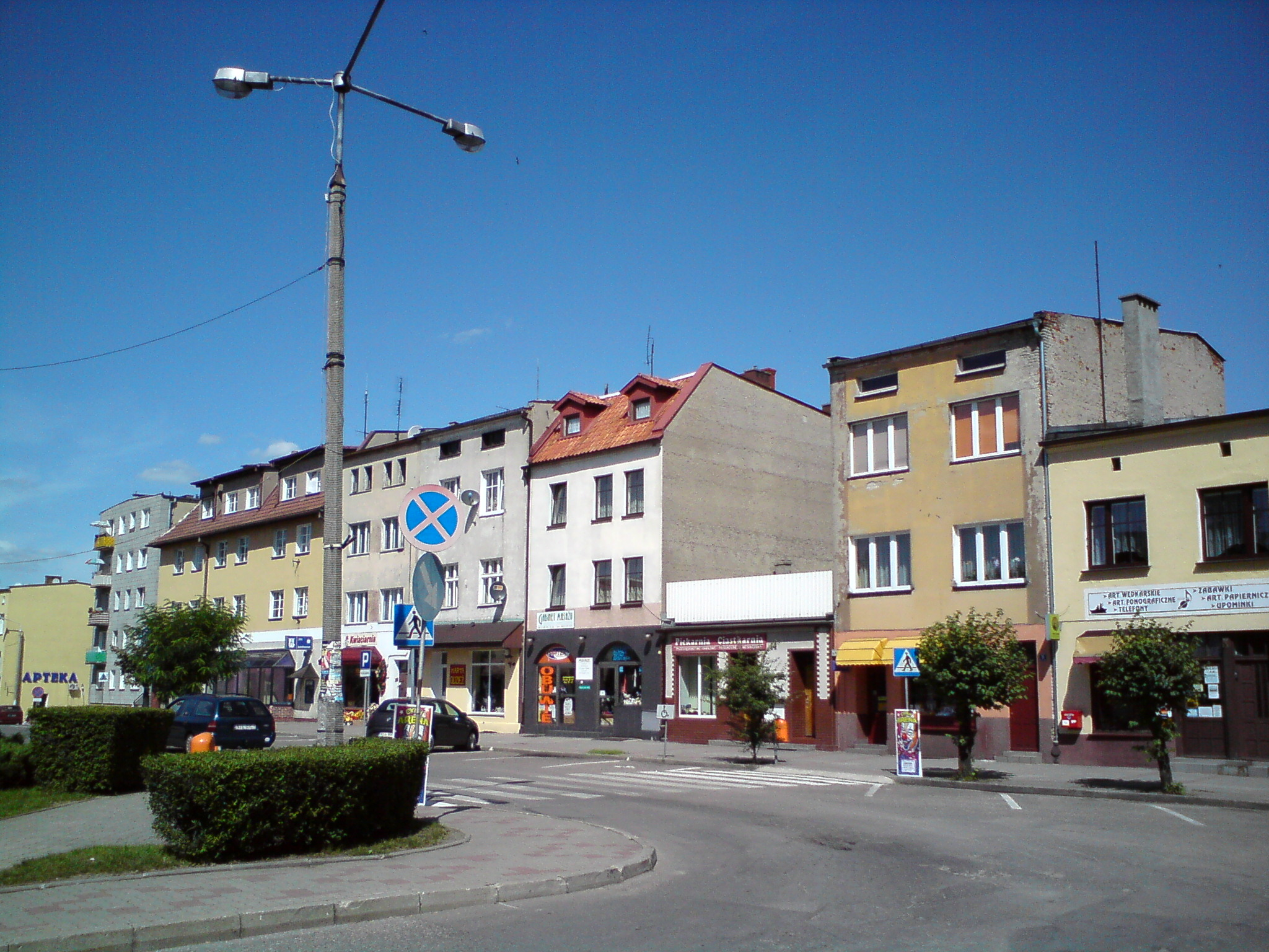 Rynek w Lubawie, pierzeja wschodnia